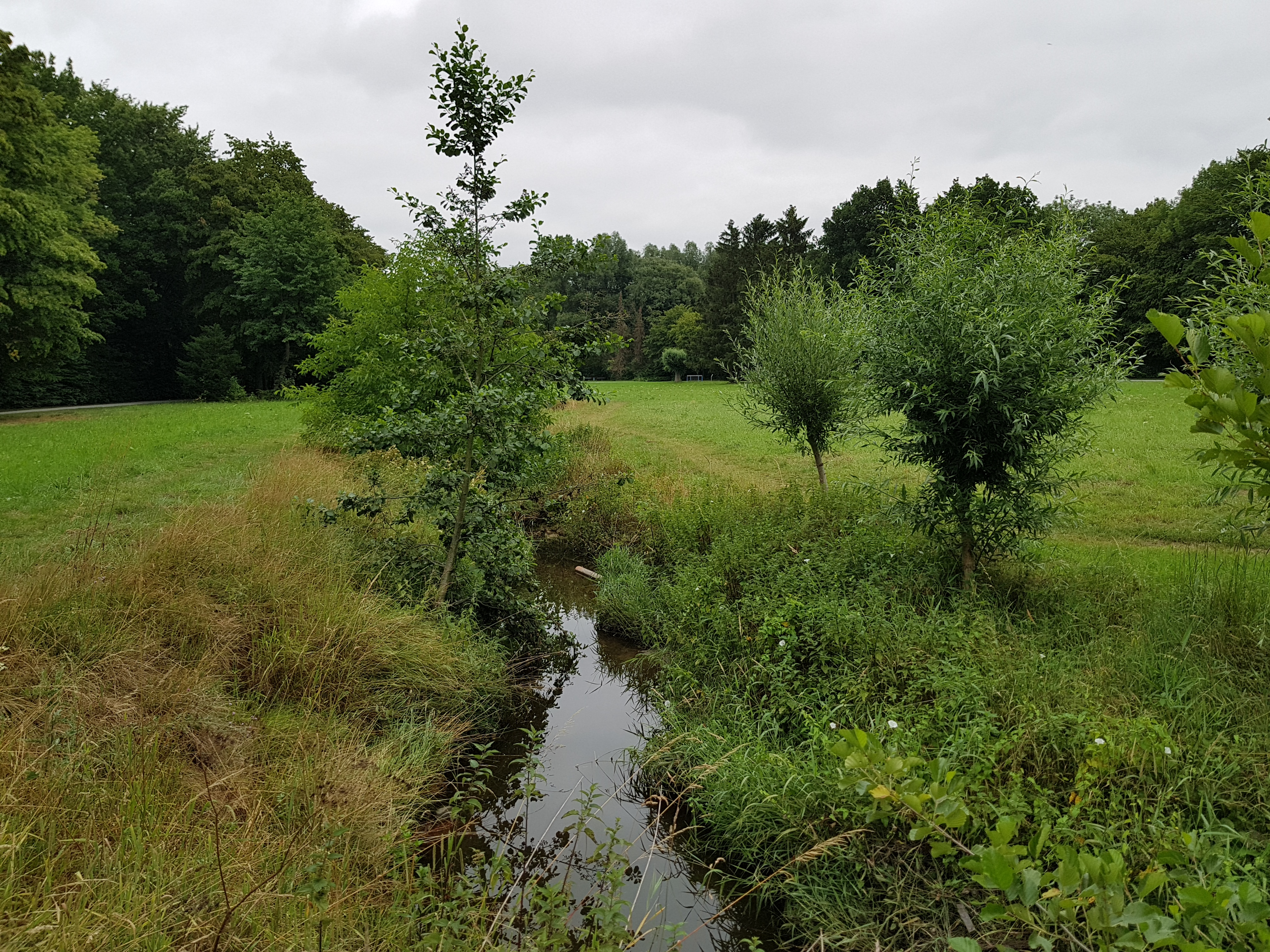 Schlosshofbach Bielefeld im Bultkamp Grünzug